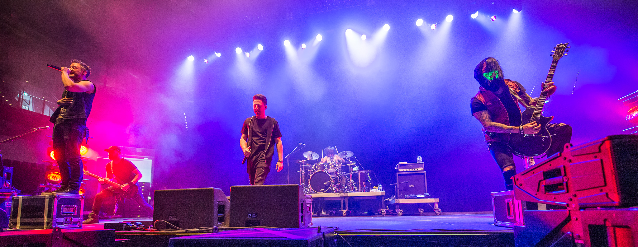 ARGO-Konzerte,Alternarena,Branden "Boo" Kreider,Chris Musser,Festival,From Ashes To New,Konzert,Lance Dowdle,Livekonzert,Livemusik,Matt Brandyberry,Musik,RiP,Rock im Park 2016,Tim D'onofrio